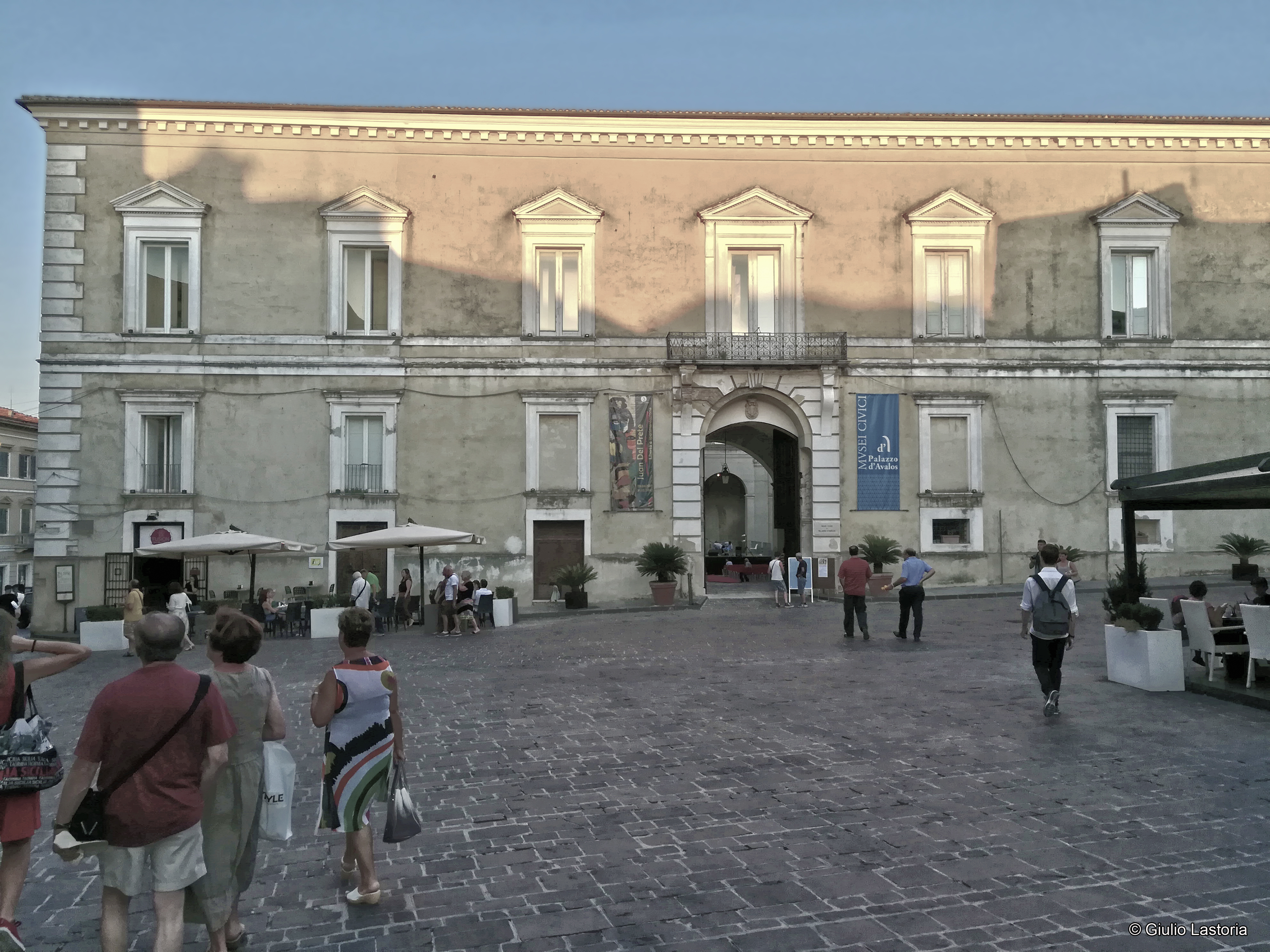 L'ingresso di Palazzo d'Avalos This is a photo of a monument which is part of cultural heritage of Italy.